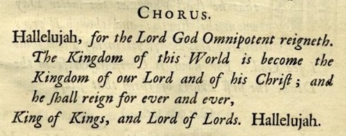 Händel, Messias, Halleluja (Textbuch 1749)